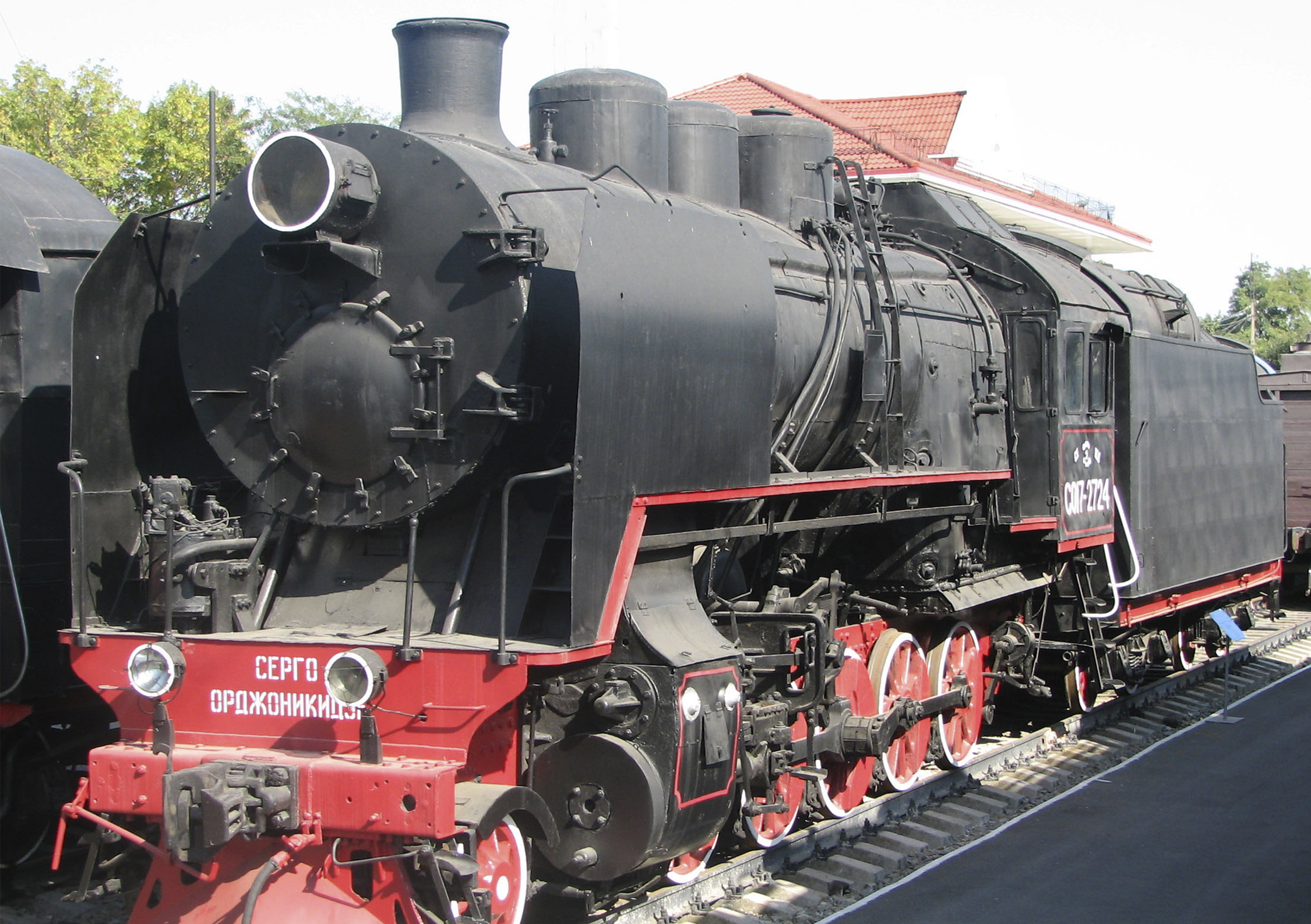 Паровоз построен в 1947 году Улан-Уденским паровозостроительным заводом